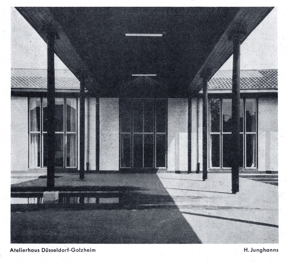 t